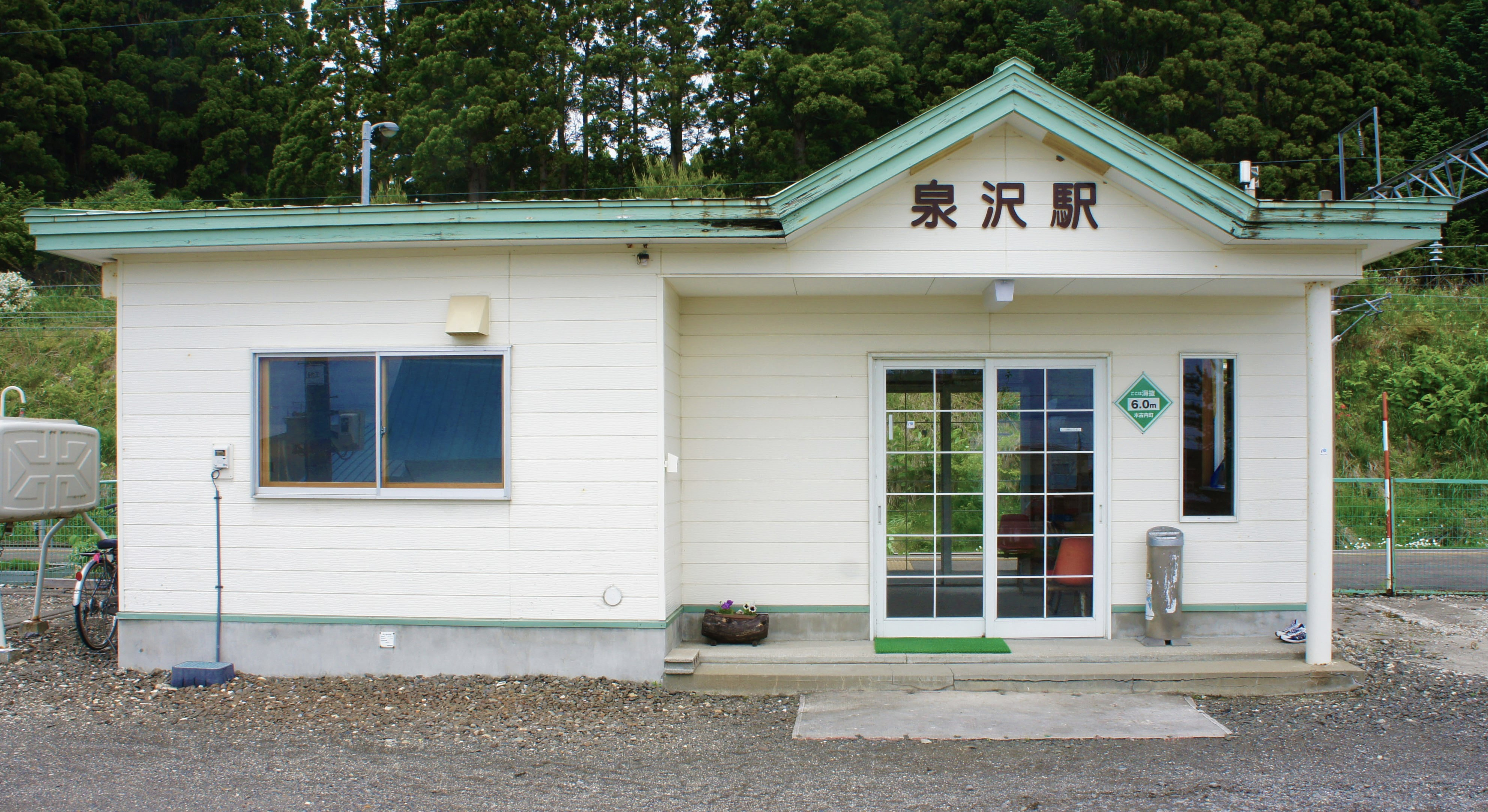 道南いさりび鉄道線・泉沢駅の駅舎